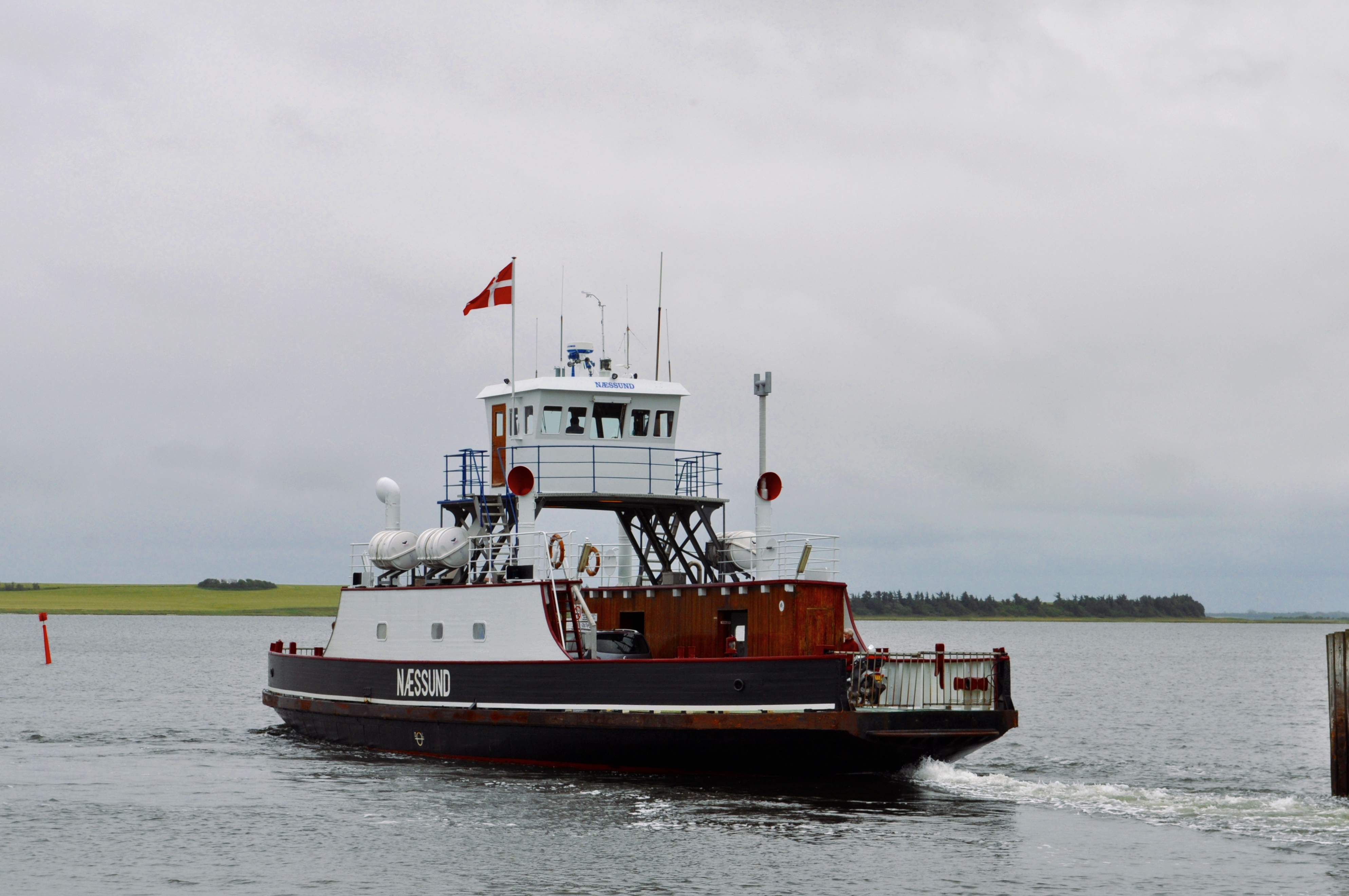 Næssund ferry.